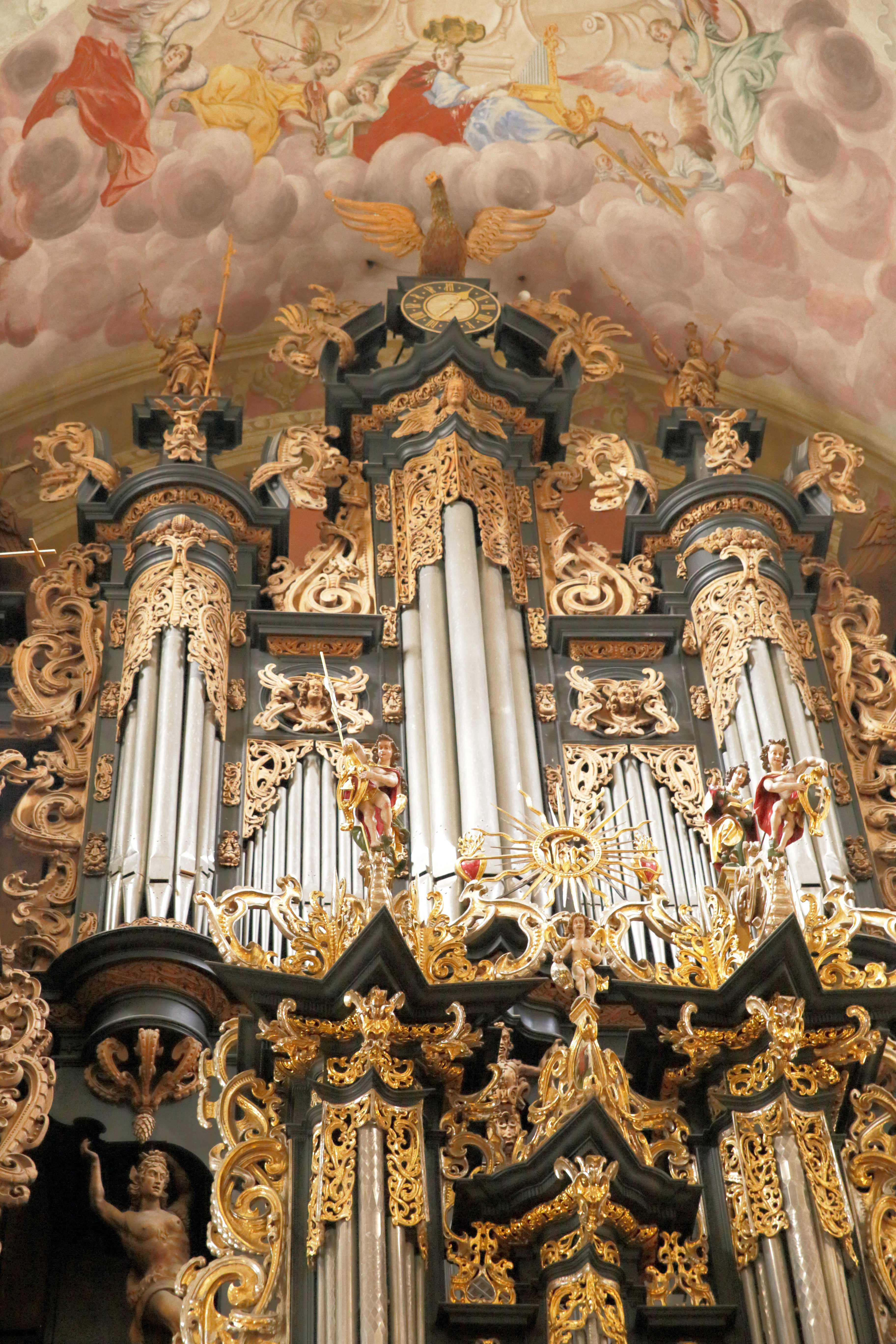 Organy w Leżajsku - detal (Oberwerk).